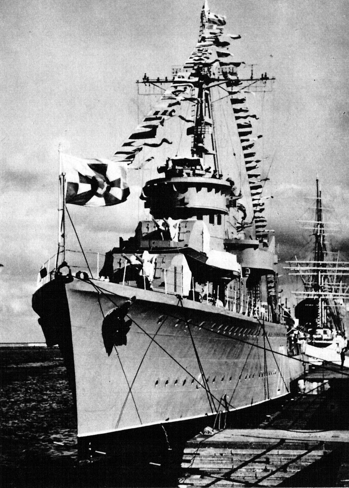 Niszczyciel ORP "Błyskawica" po 1960 roku